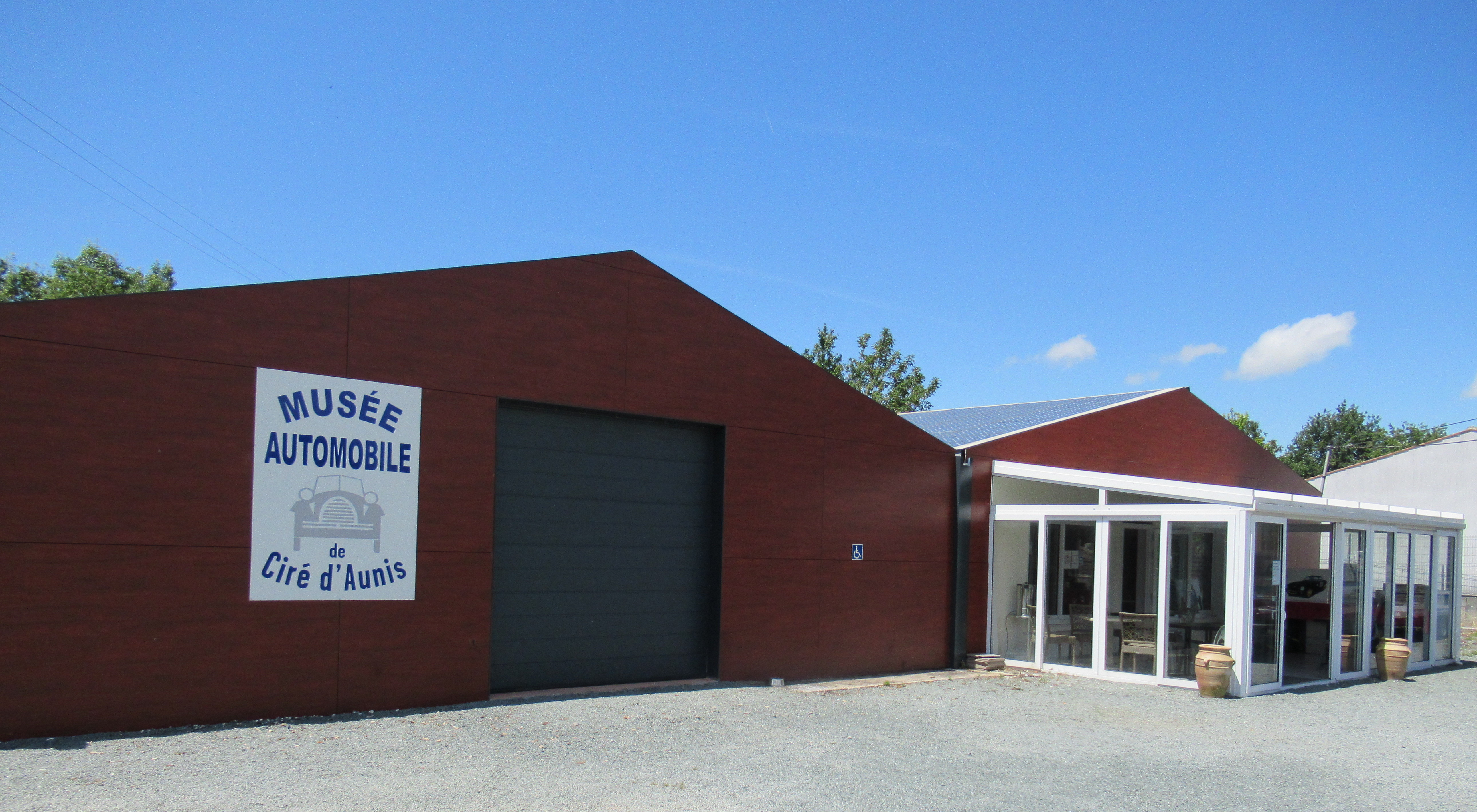 Musée de l'automobile de Ciré d'Aunis (17), sis 18 rue de Rochefort.